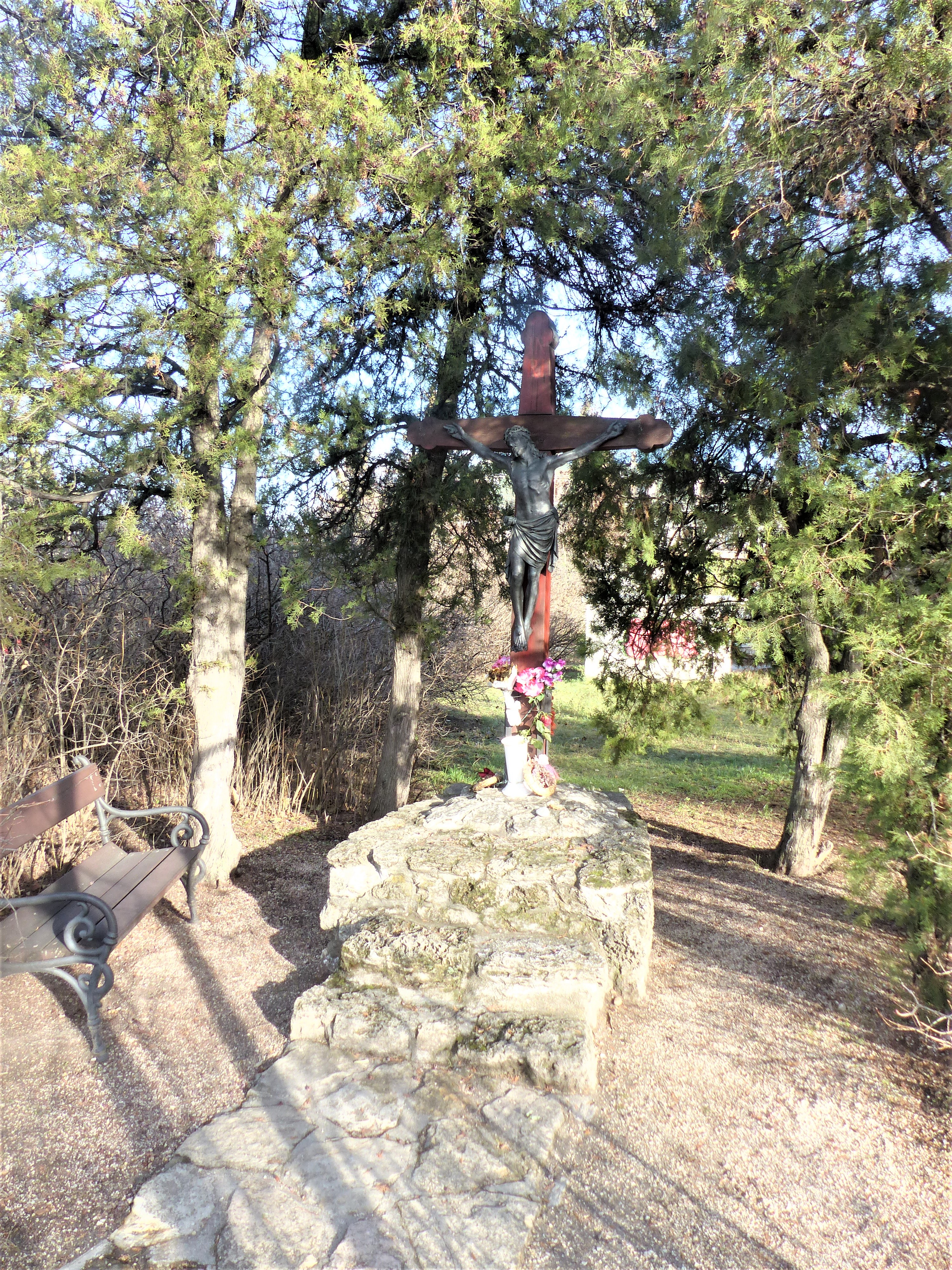 Kereszt a Lejtő út és a Hegyalja út kereszteződésénél. A keresztet valószínűleg az első világháború után állították. 2004-es felújításokor talált felirat szerintː „Isten dicsőségére emelte megalakulása alkalmával a farkasréti római katolikus egyházközség 1946. október 10-én.” A felújítást Szalay Etelka tanárnő kezdeményezésére Simó József építészmérnök és Madarassy István ötvös-szobrászművészt valamint Péter Zsuzsa végezte. A sashegyi mészkő lábazatot Tarnai László és családja állította helyre. [1]